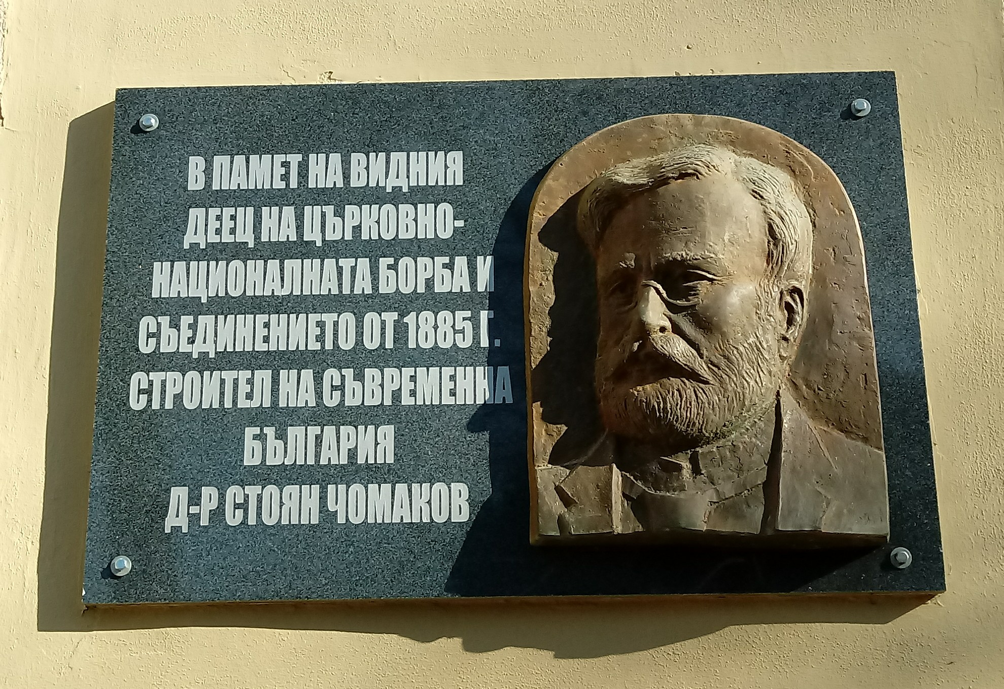 Stoyan Chomakov memorial plaque, Plovdiv